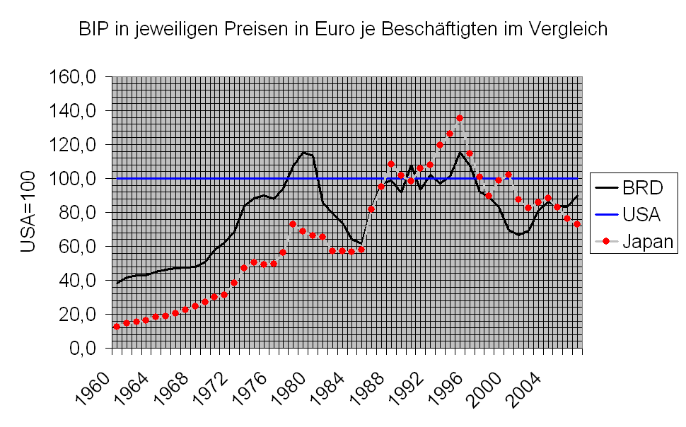 Arbeitsproduktivität USA und BRD in Euro, laufende Wechselkurse, USA gleich 100 gesetzt